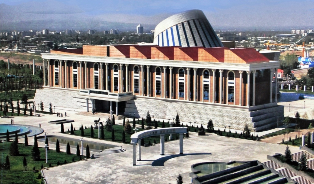 Национальный музей Таджикистана - новое здание музея, 2013 год, Душанбе